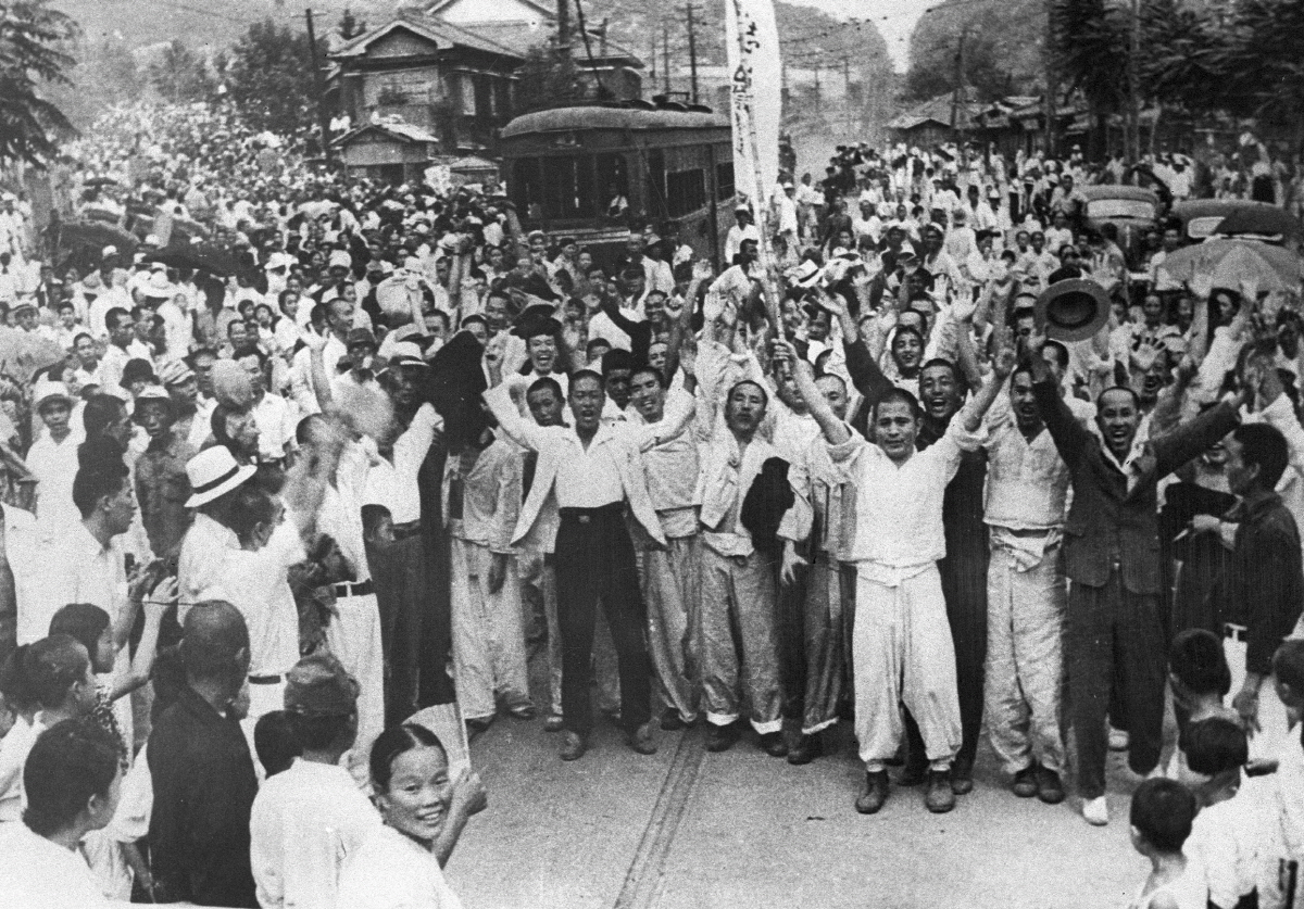 마포형무소 1945년 8월 16일 오전9시